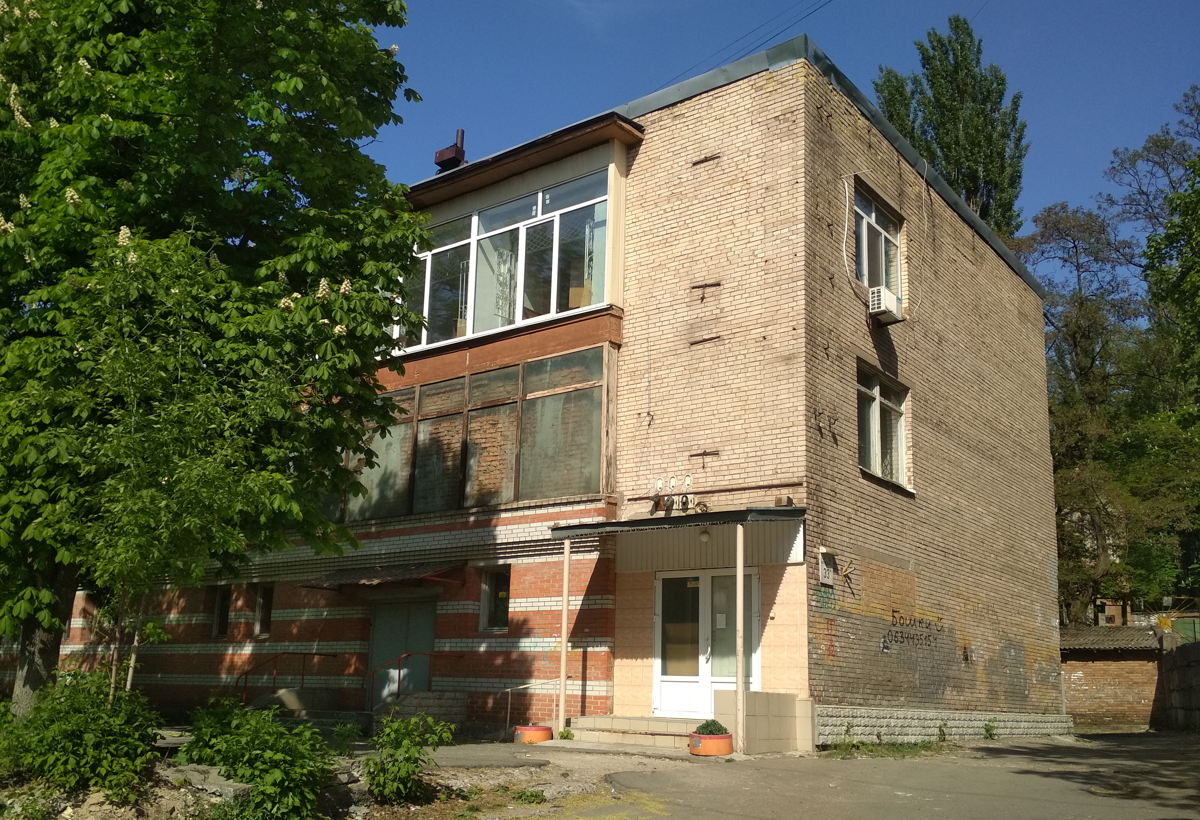 Государственный архив города Киева (читальный зал № 2) (Киев, ул. Владимира Сальского, 33а)